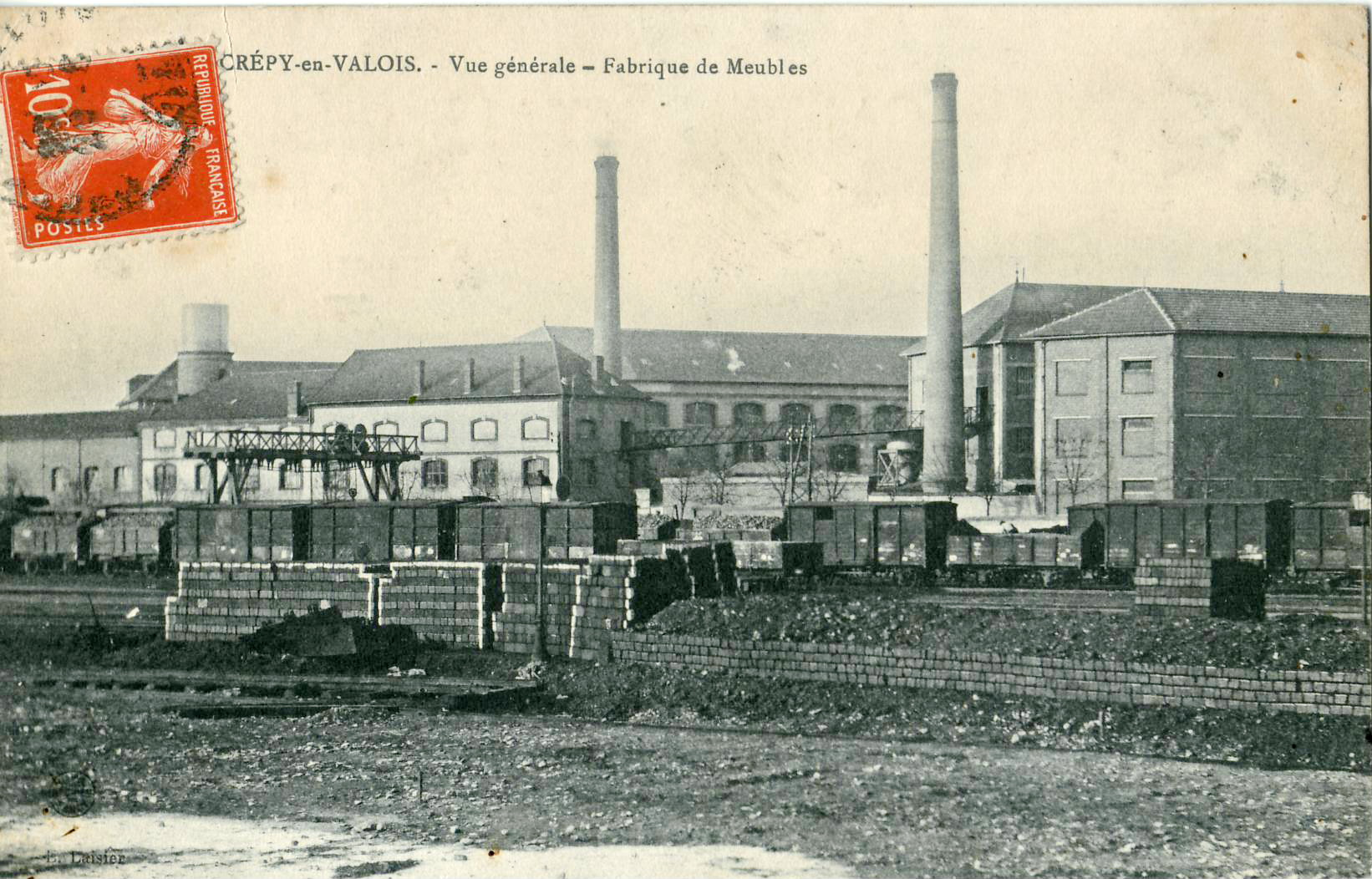 Carte postale ancienne éditée par E. Laisier :CRÉPY-EN-VALOIS - Vue générale - Fabrique de Meubles